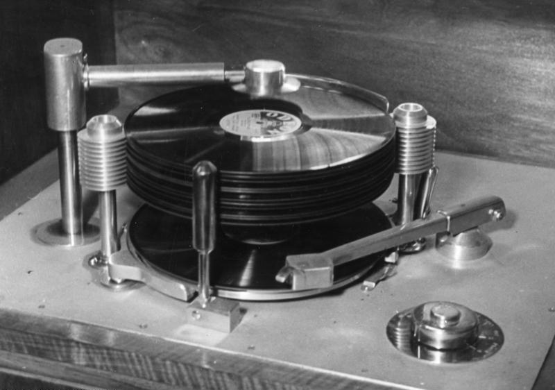 Leipziger Messe, Dauerplattenspieler Die Leipziger Frühjahrsmesse 1949. Der Polte-Plattenspieler. Ein Dauerplattenspieler, der die größte Schonung der Platten garantiert, da sich die Platten nicht mehr berühren und ohne jede Hilfe selbstständig gewendet und aufgelegt werden. Aufn: Illus/Blunck